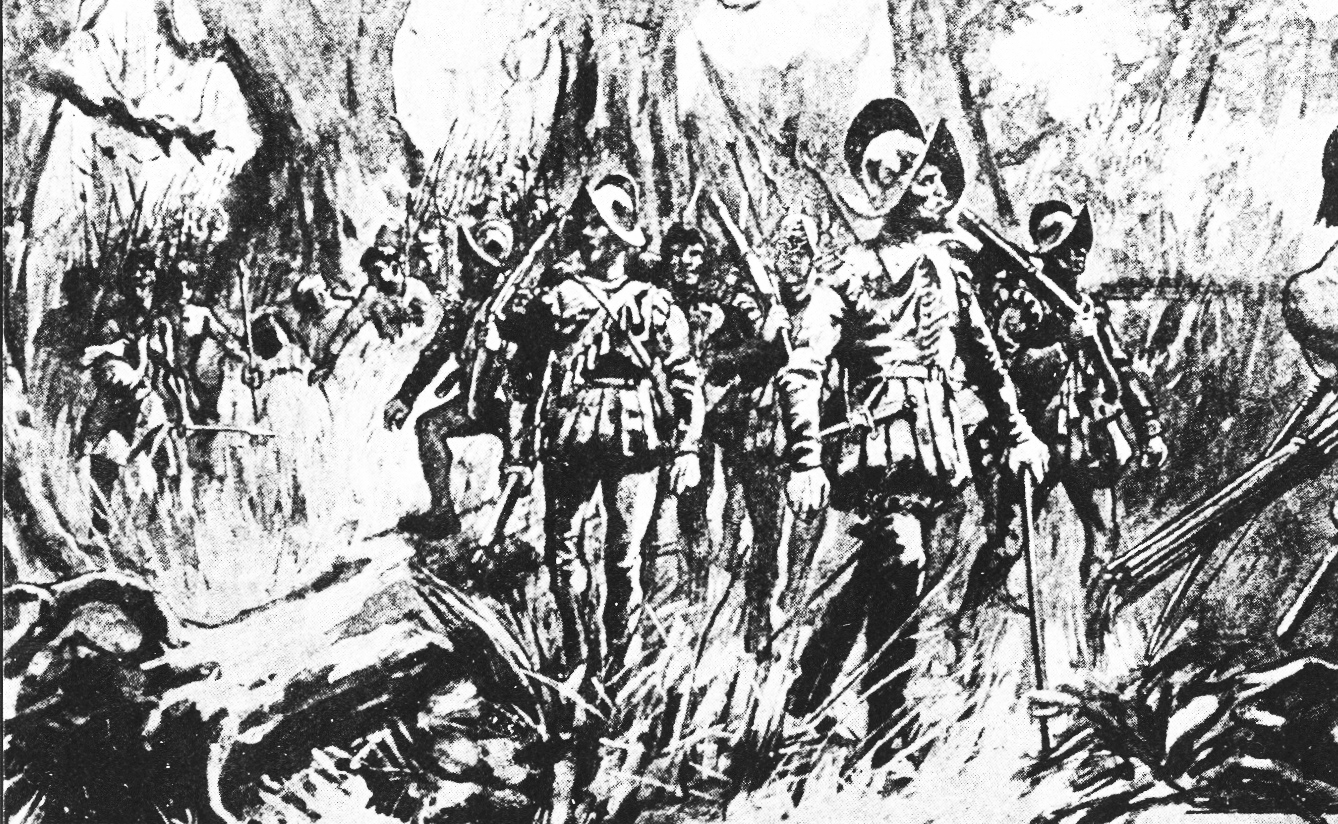 Entrada de Diego de Rojas al actual territorio del Noroeste Argentino